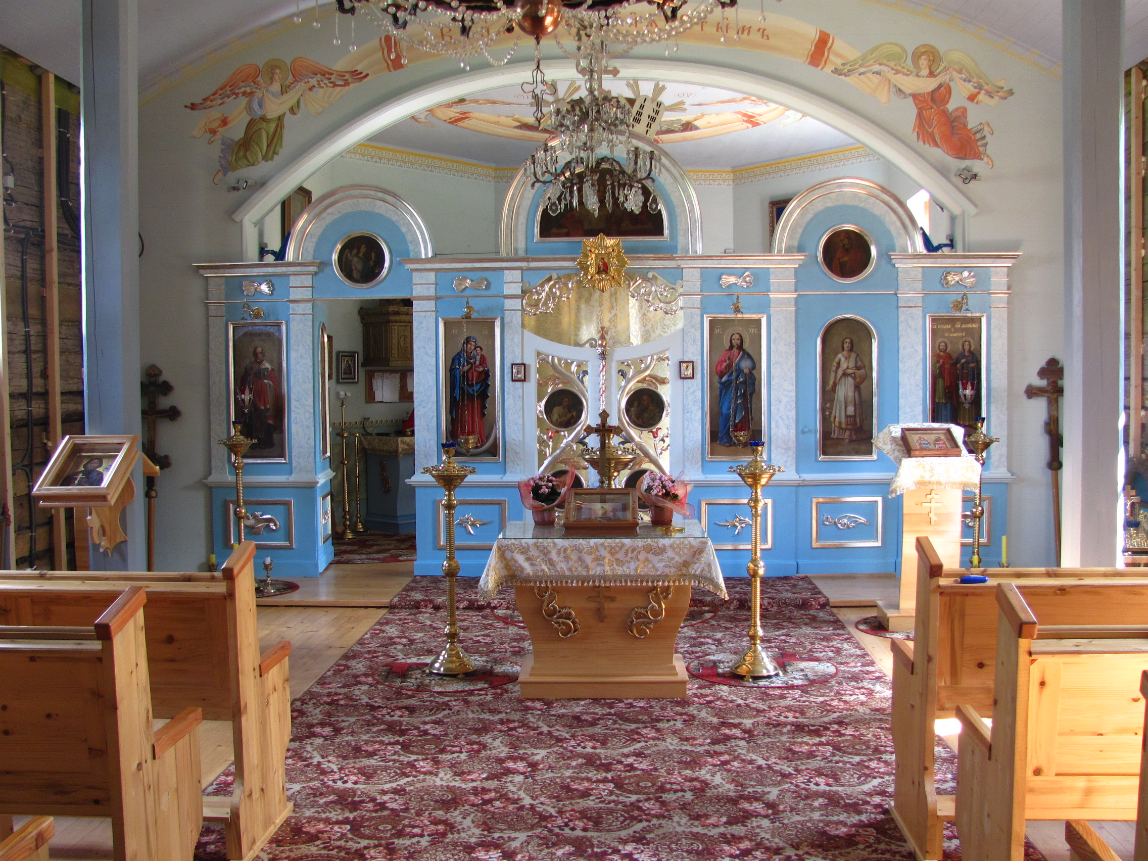 Bartne, Cerkiew prawosławna ŚŚ. Kosmy i Damiana, wnętrze cerkwi